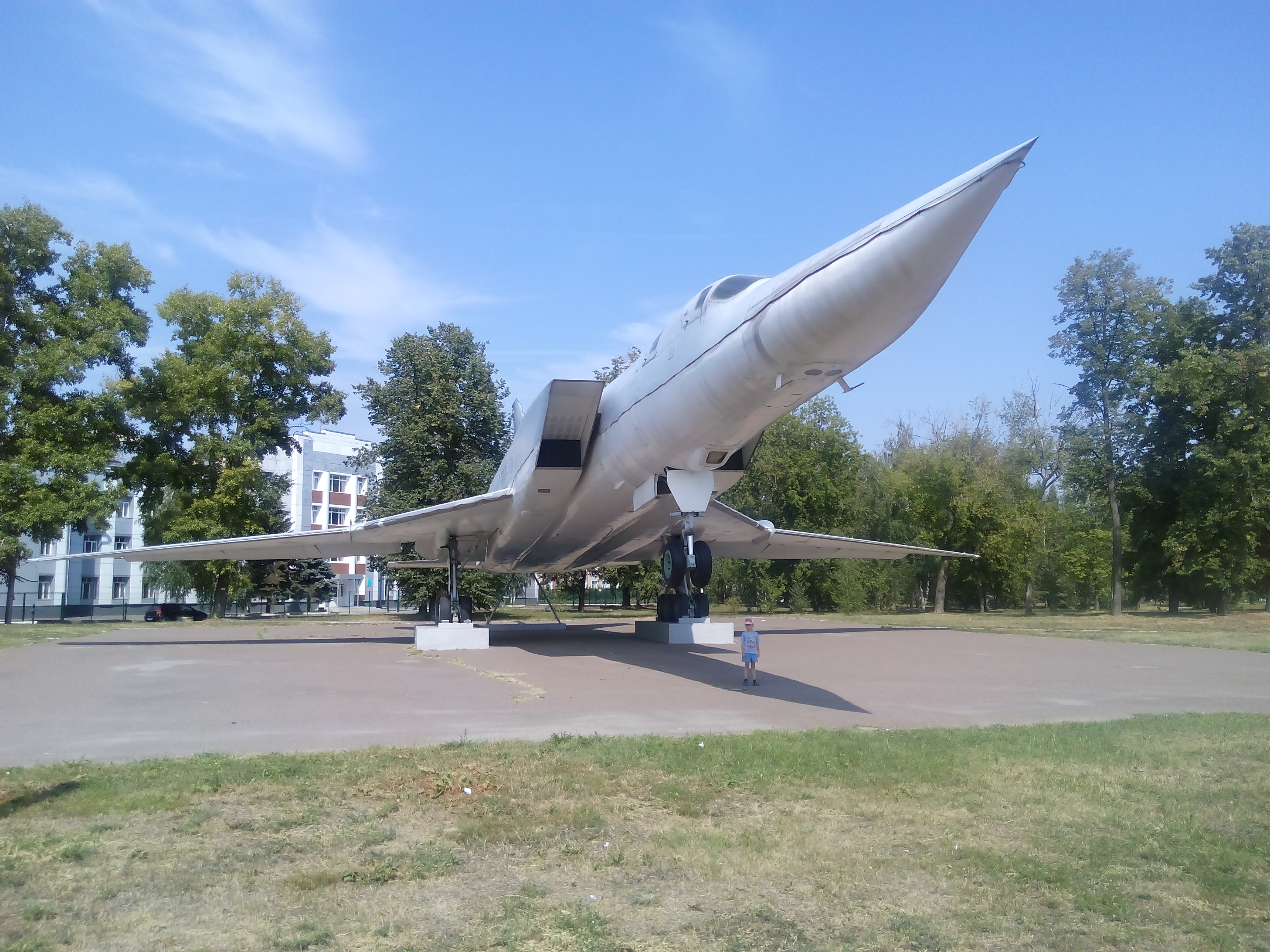 Корпус последнего Ту-22м3 собранного в 1997 году на постаменте возле Казанского авиационного завода им Горбунова